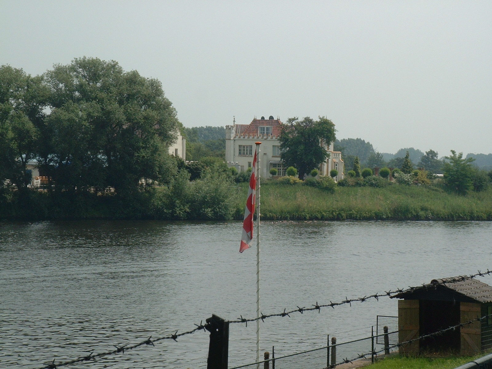 Kasteel Meerwijk gezien vanuit Engelen. De niet uitgewaaide vlag is de vlag van Noord-Brabant.